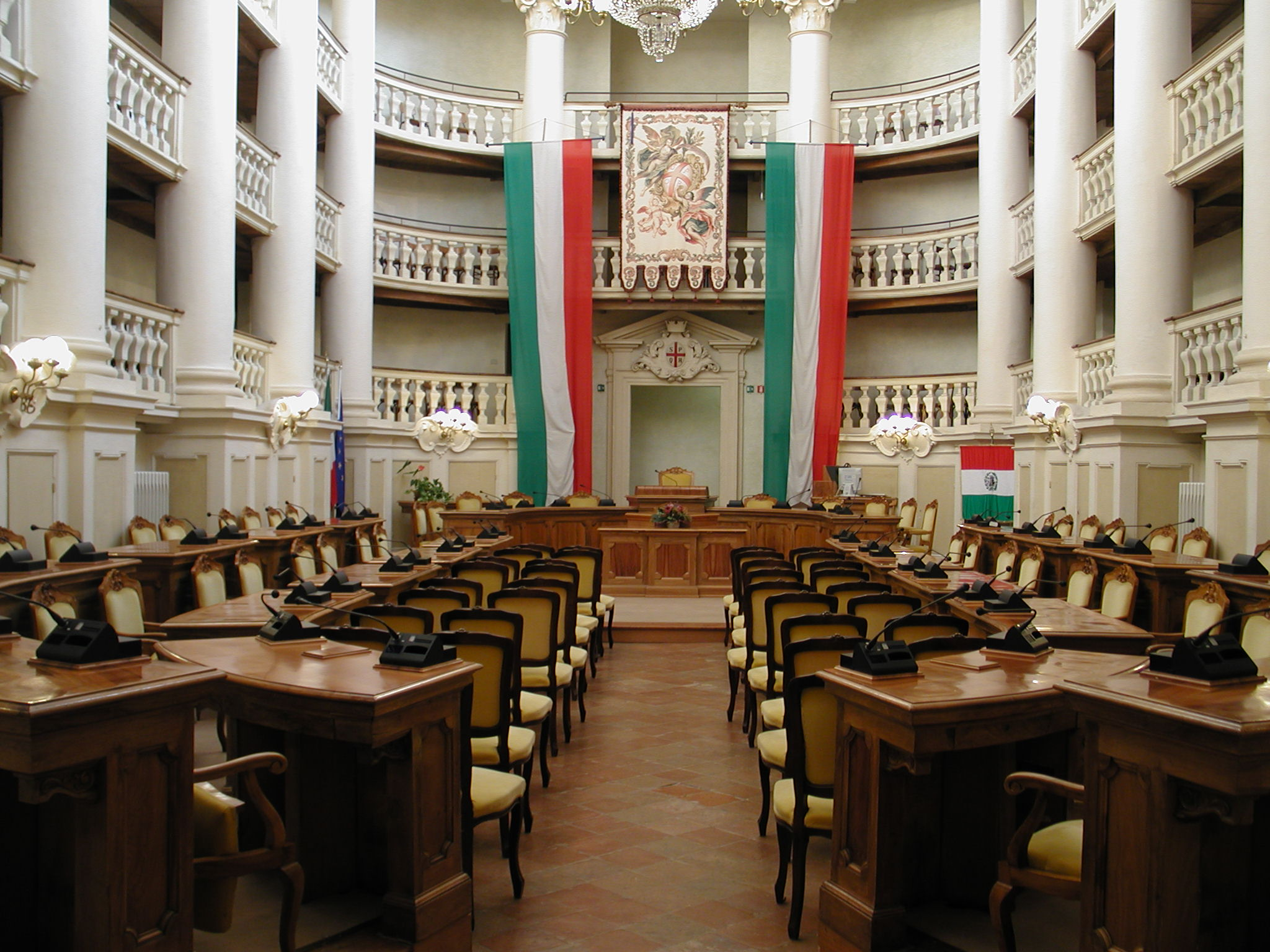 Reggio Emilia Sala del tricolore author:Paolo da Reggio